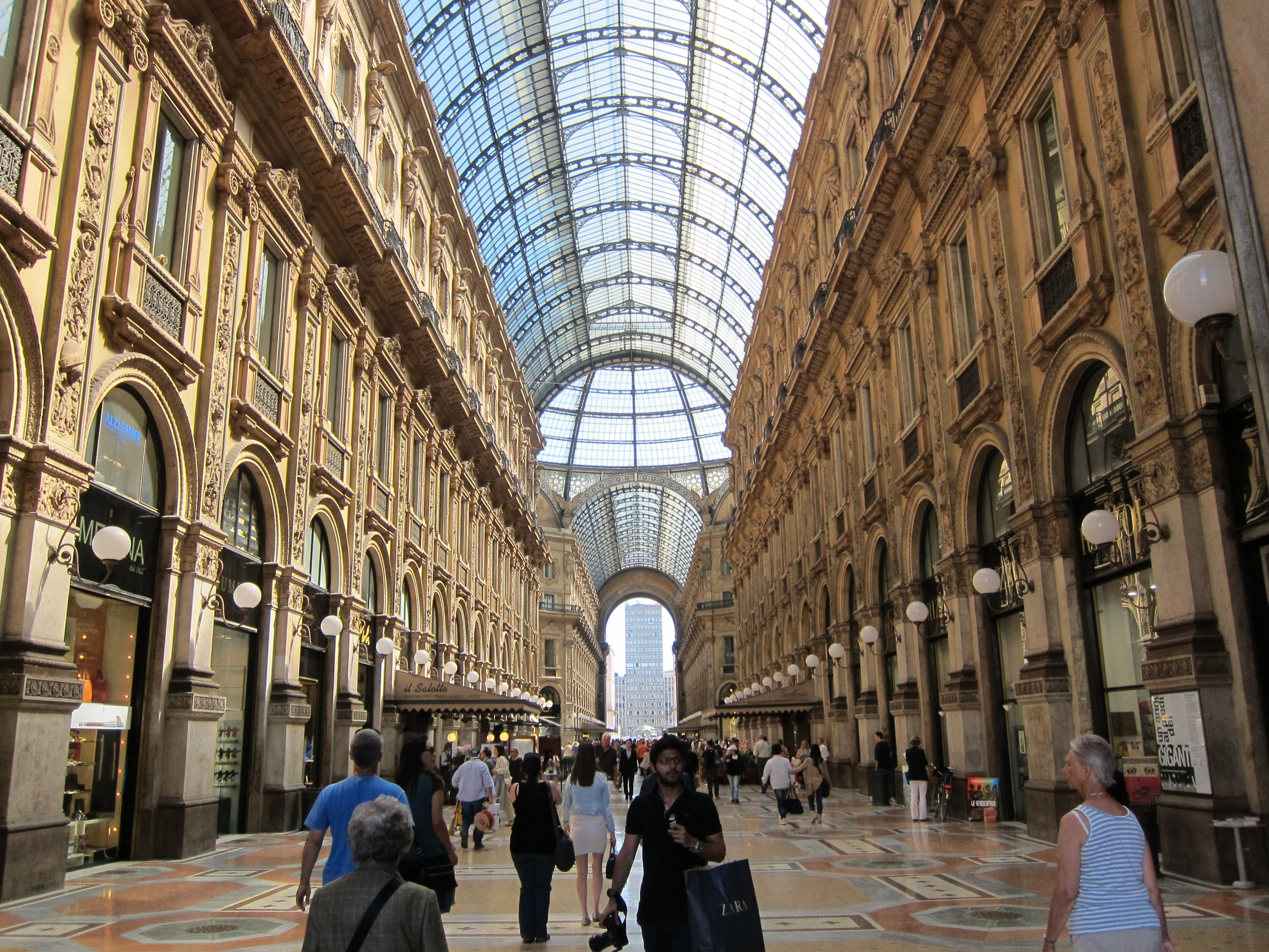 Milano